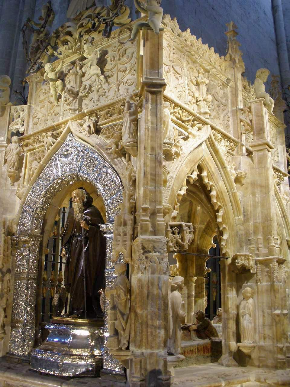 Concatedral del Salvador y Santa María, Santo Domingo de la Calzada (La Rioja). Sepulcro del Santo